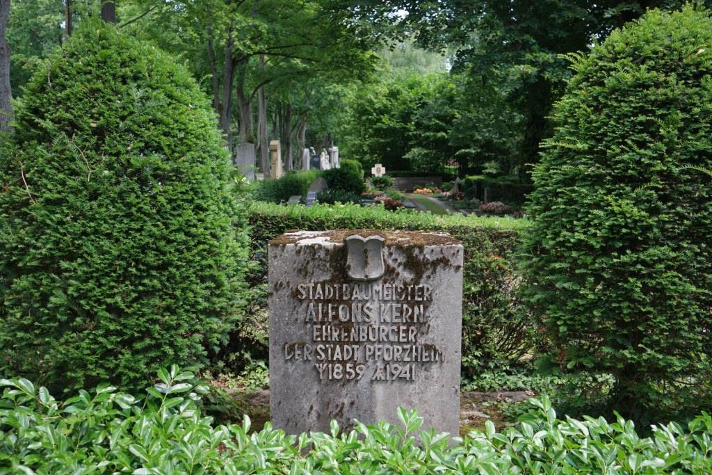 Grab von Alfons Kern (1859-1941), Architekt und Baubeamter, auf dem Pforzheimer Hauptfriedhof